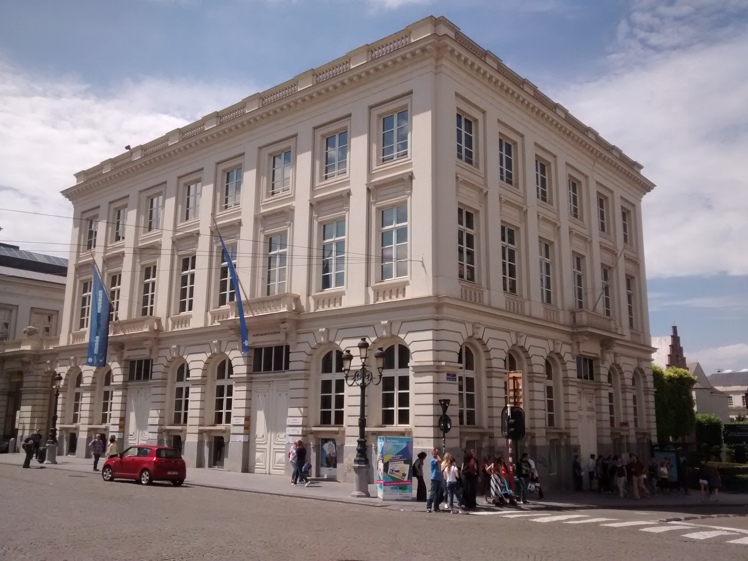 Magritte Museum in June 2016.